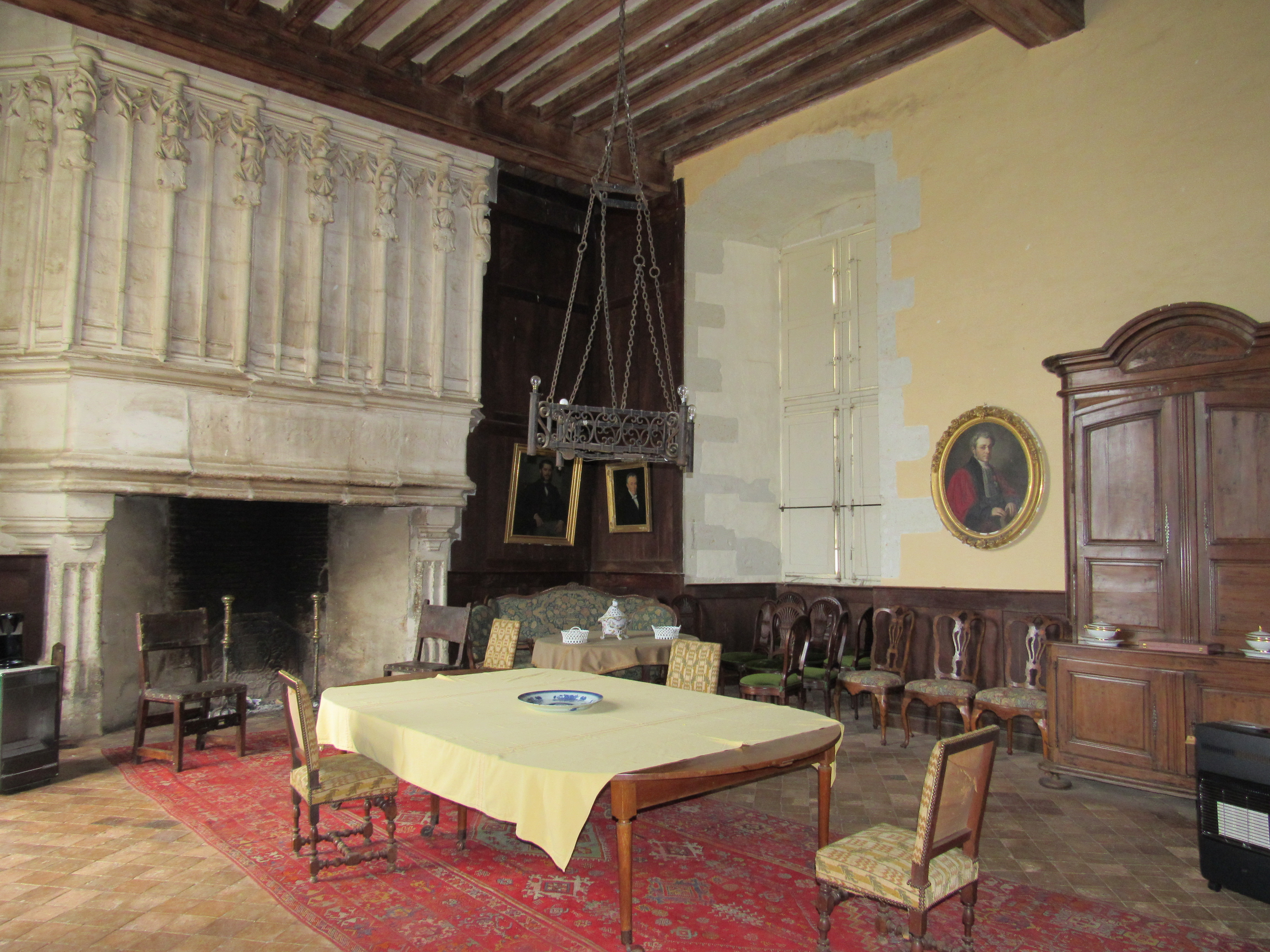 La salle à manger du château de la Motte-Glain, avec la cheminée ornée de coquille Saint-Jacques.